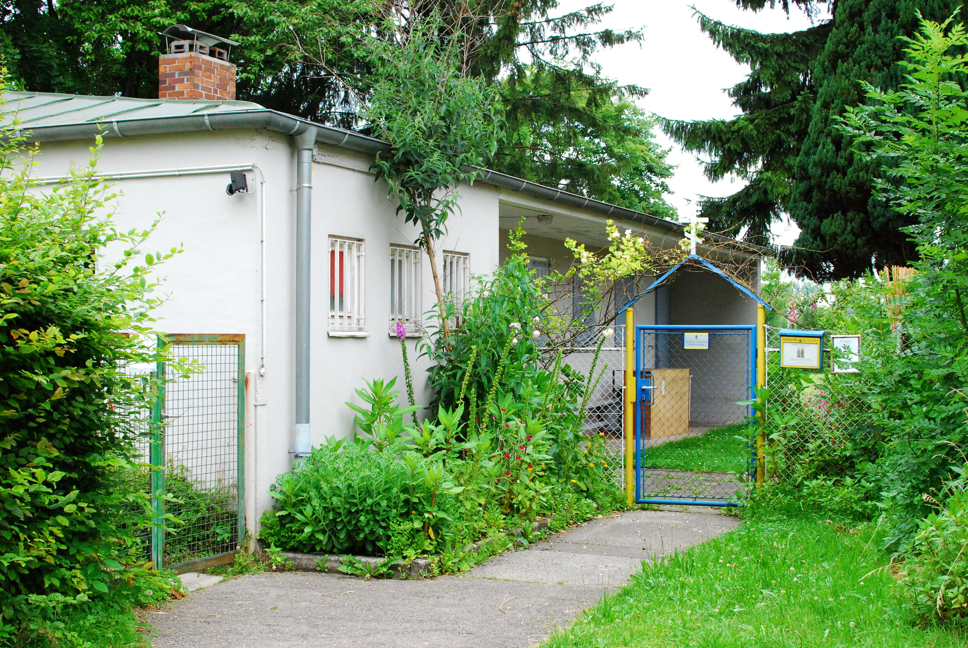 Ukrainische Orthodoxe Kirche Hl. Apostel Petrus und Paulus in Ludwigsfeld, München, Oberbayern, Bayern.